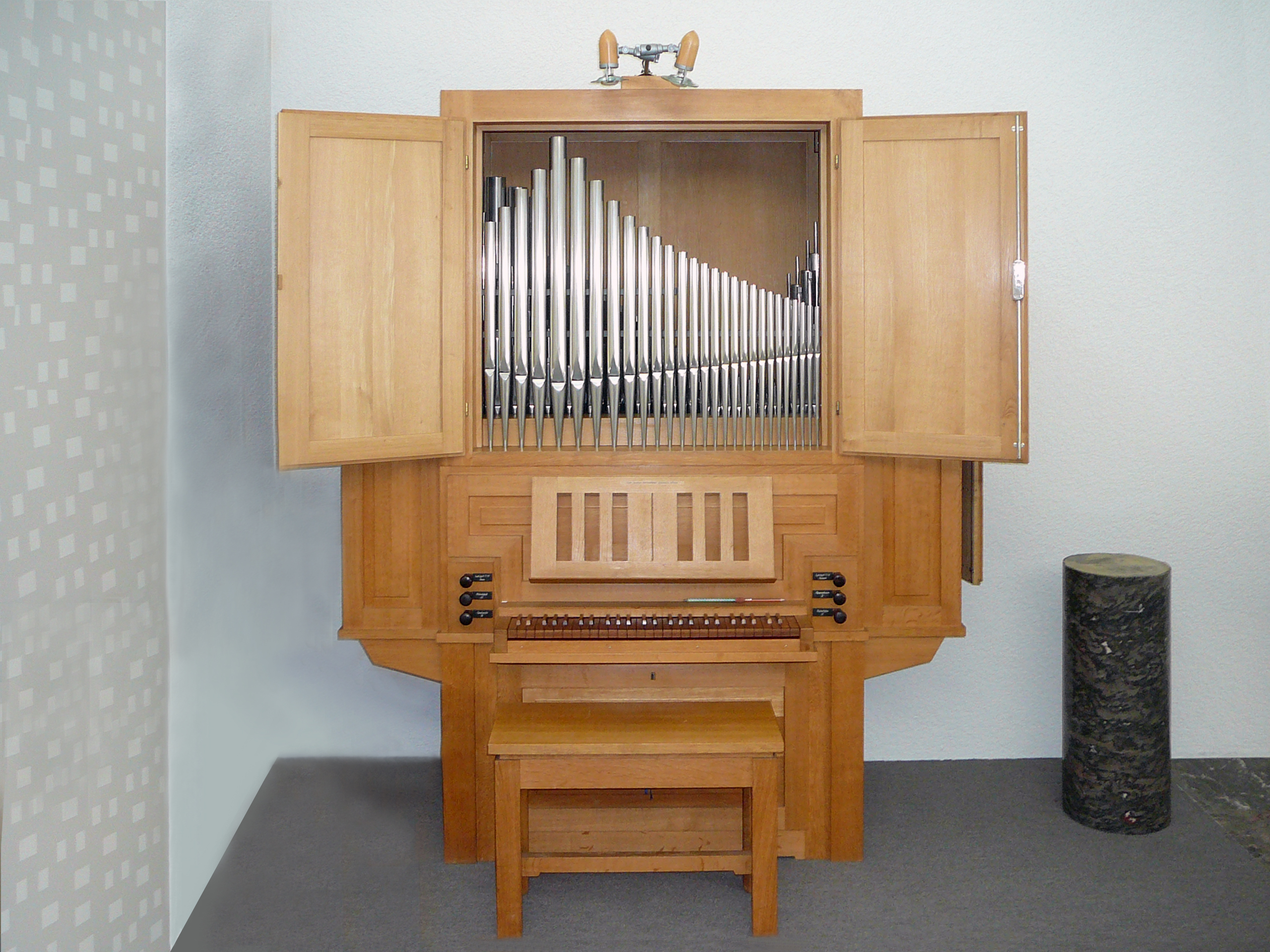 Römisch-katholische Pfarrkirche Bruder Klaus Urdorf, Orgel in der Kapelle